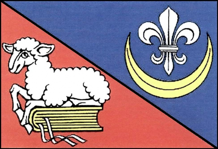 vlajka, Skorotice, okres Žďár nad Sázavou